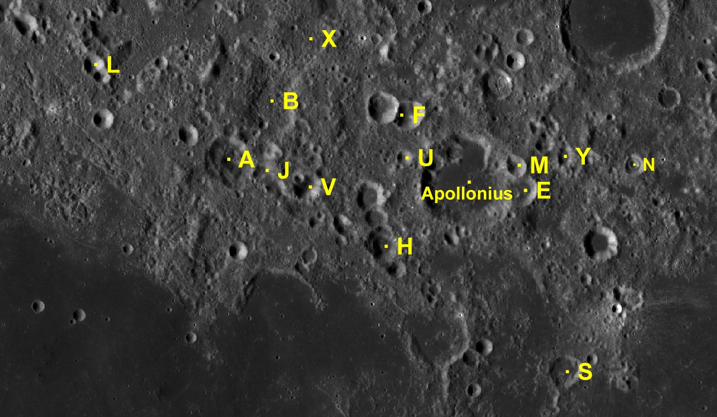 Cráter lunar Apollonius. Cráteres satélite. (Imagen LRO)